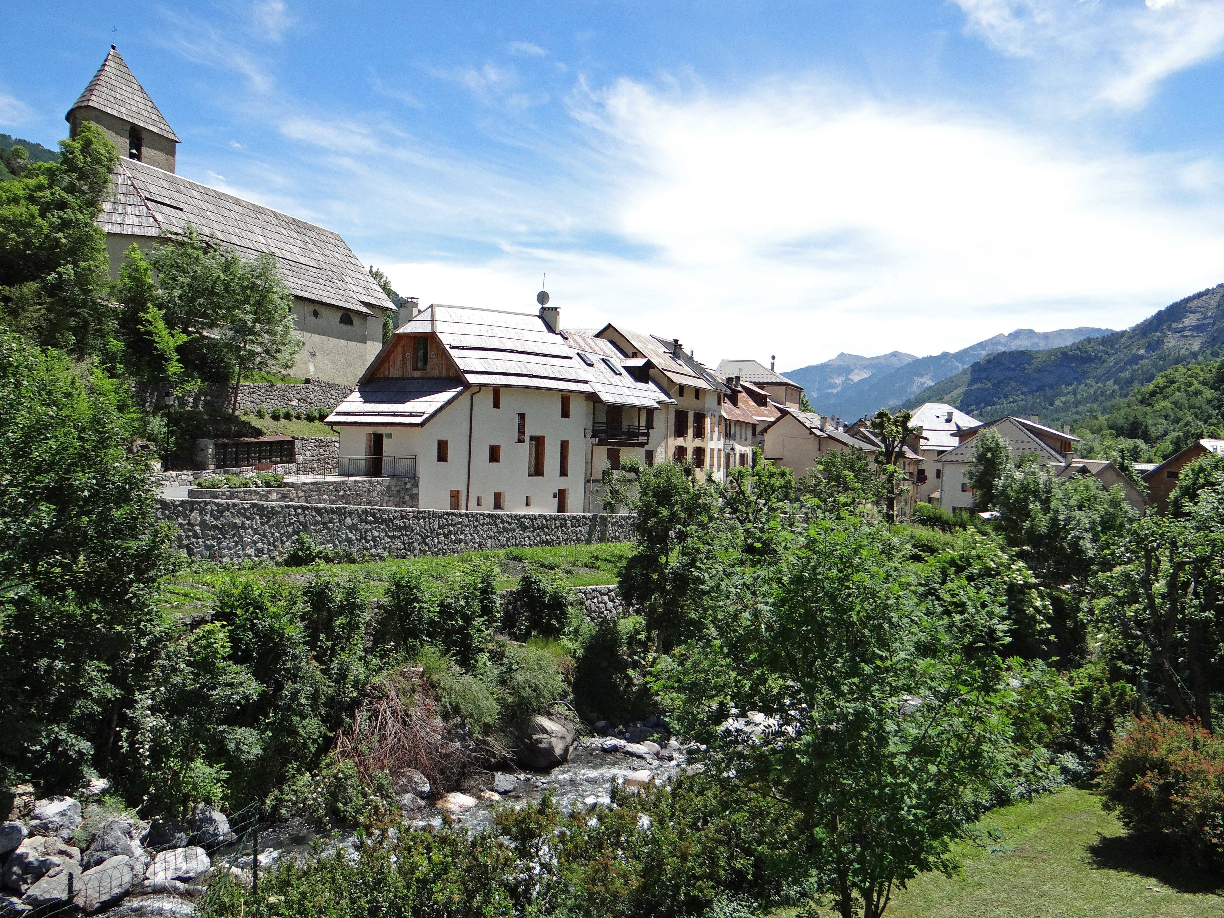 Entraunes - Église Notre-Dame-de-la-Nativité vue depuis la chapelle Saint-Sébastien